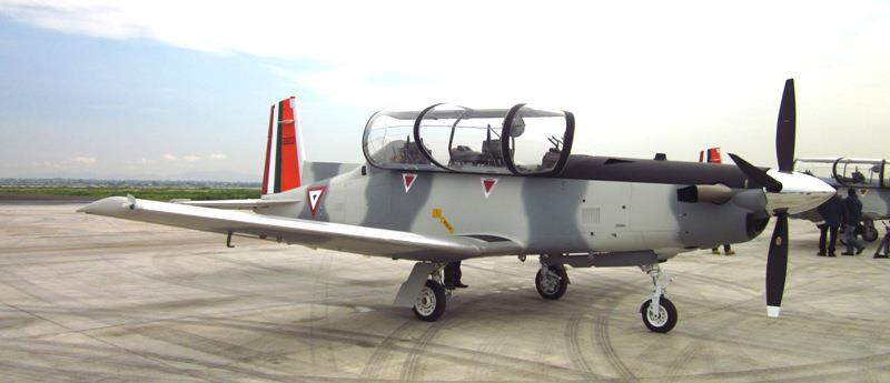 el t-6 texan en su presentacion en santa lucia edo de mex